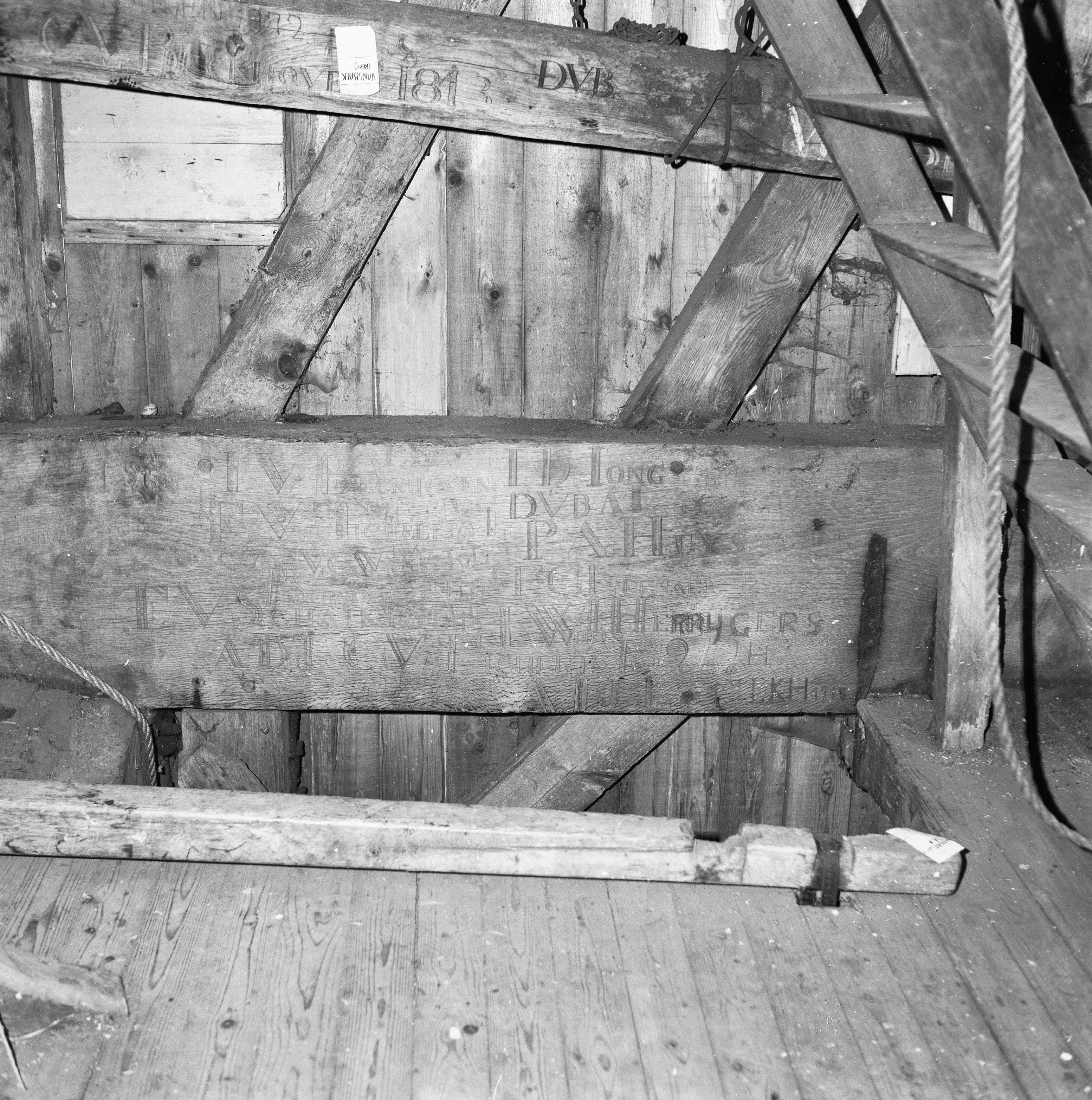 standerdmolen "Akkermolen", steenlijst